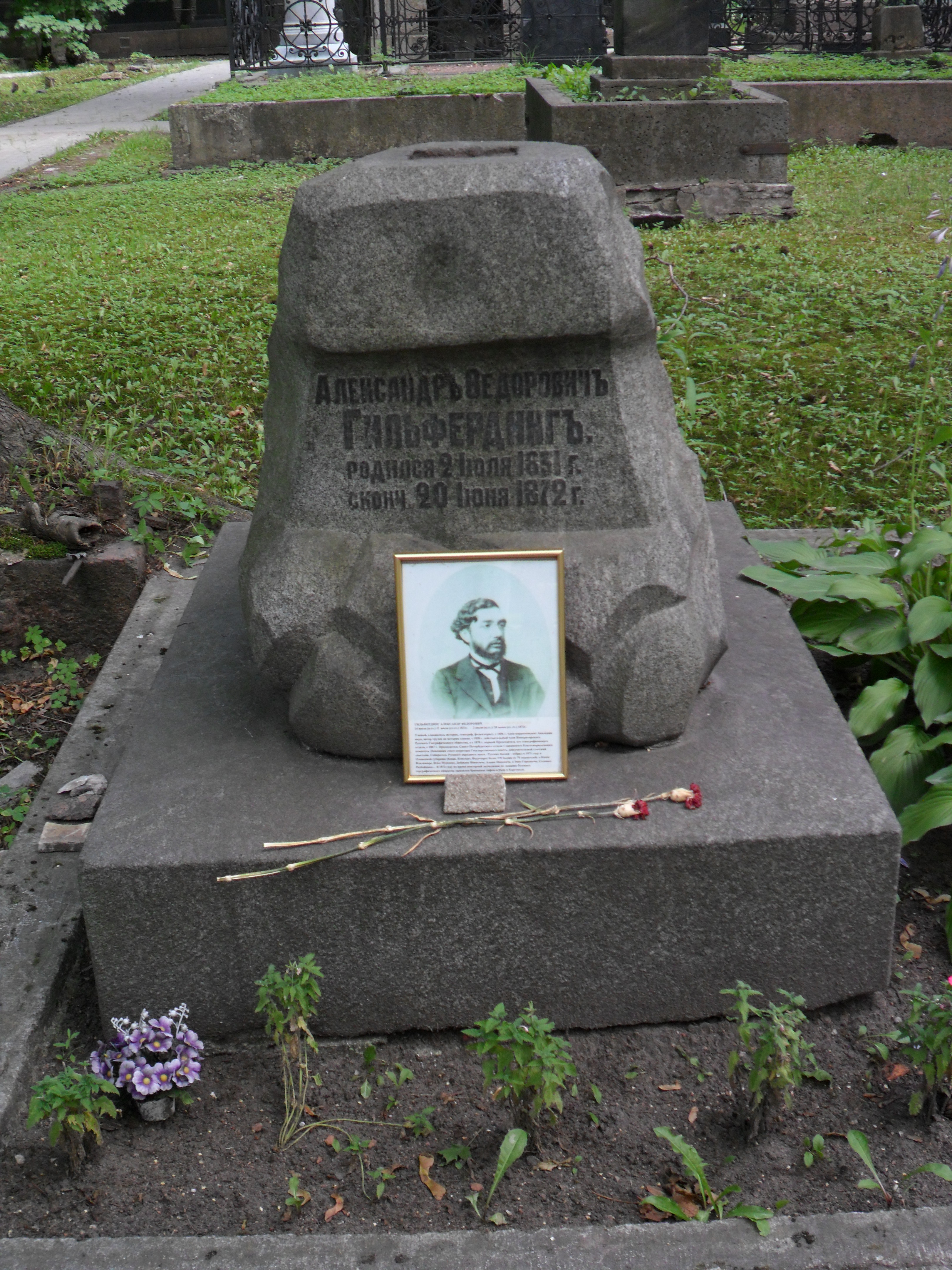 Могила русского славяноведа, фольклориста Александра Фёдоровича Гильфердинга на кладбище Новодевичьего монастыря в Санкт-Петербурге